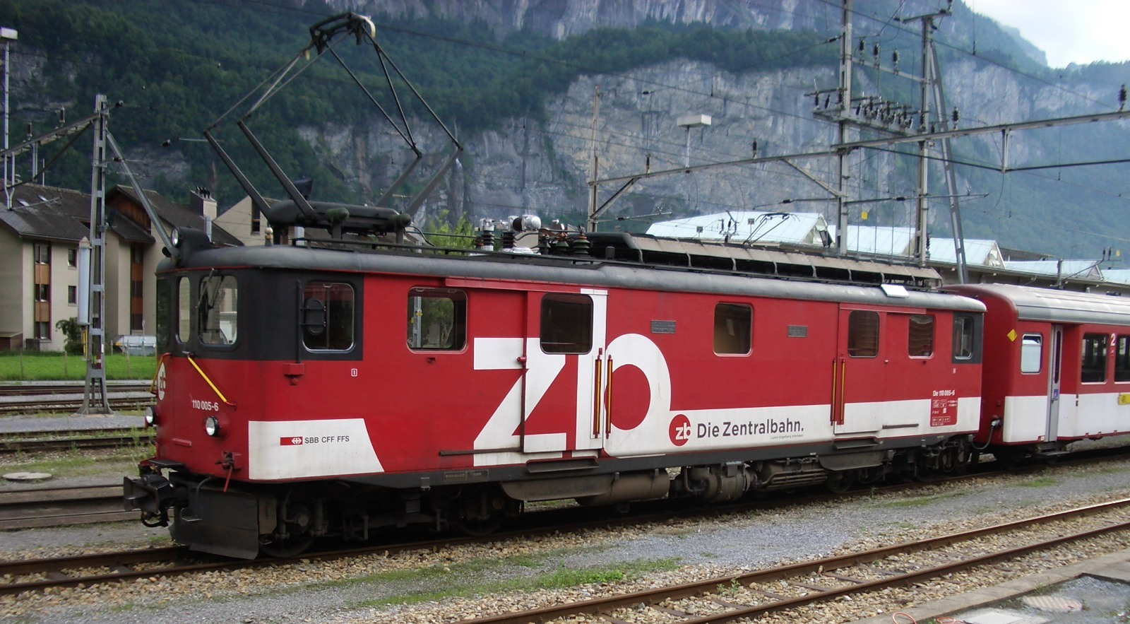 Zentralbahn De 110 005-6 in Meiringen BE, Switzerland